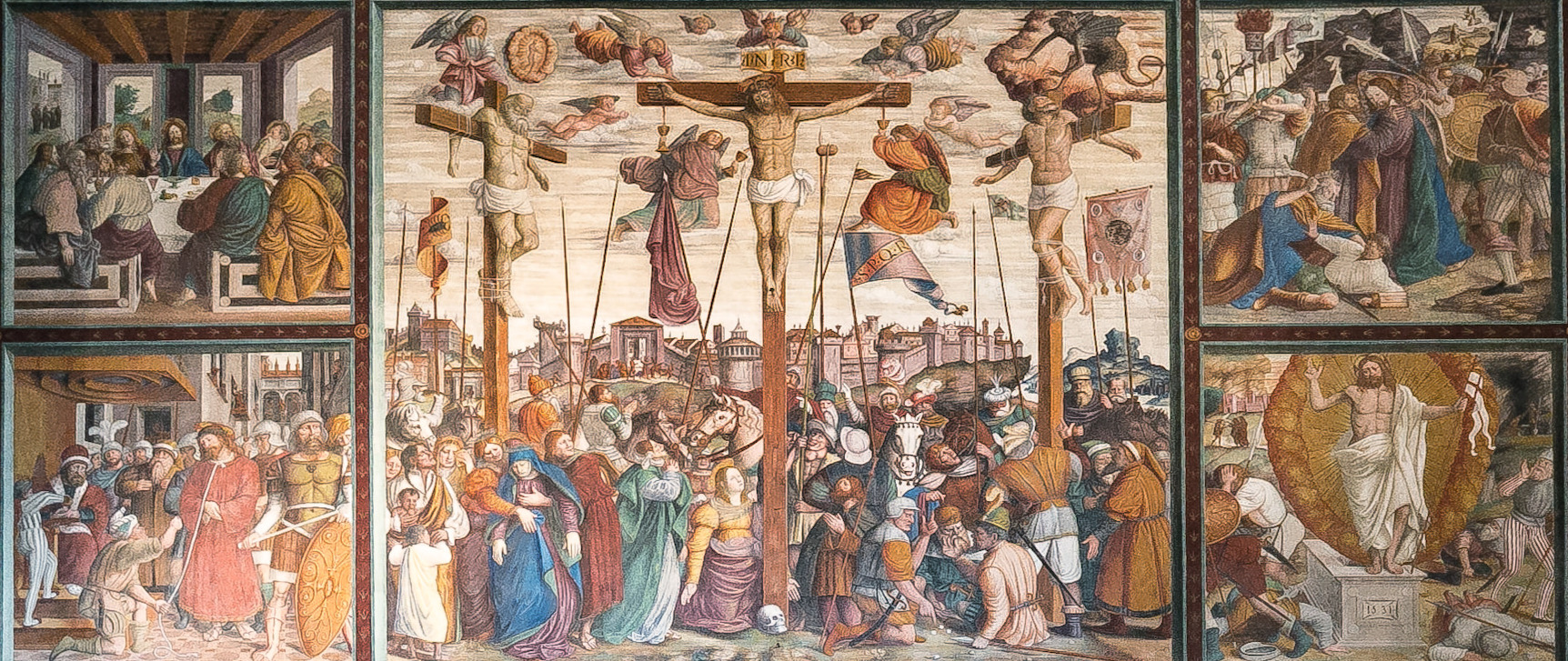 Affresco raffigurante la Passione di Gesù ospitato nella chiesa di San Bernardino a Caravaggio